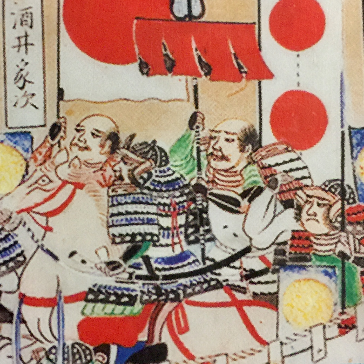 関ヶ原合戦図屏風（関ケ原町歴史民俗資料館本）に描かれた、徳川家家臣の酒井家次。